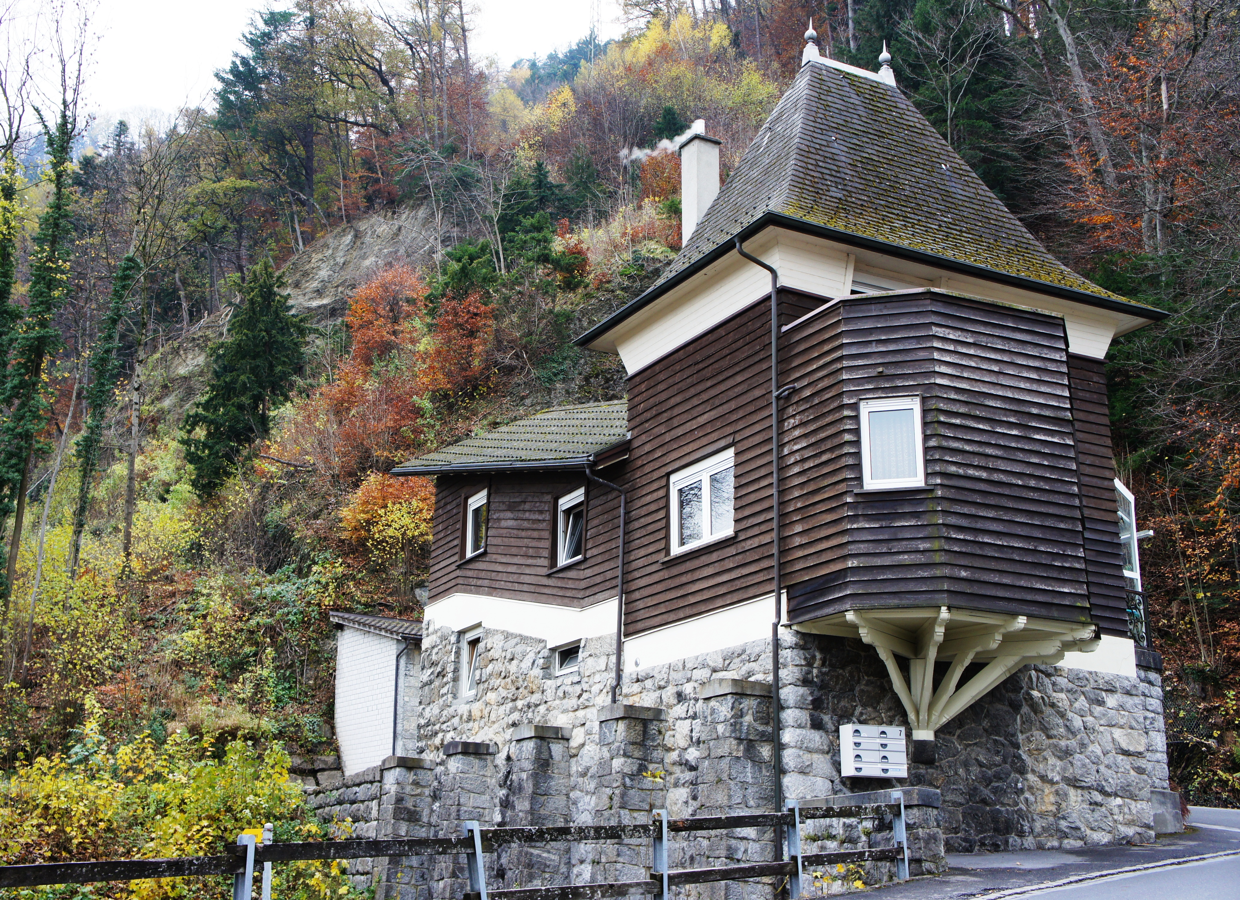 Di ehemolig Talstazion vo de Standsailbahn Ragaz–Wartestai.